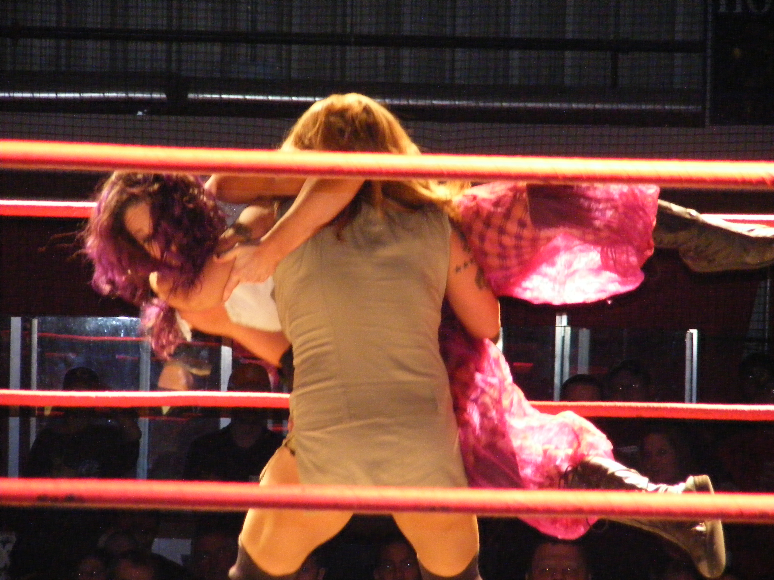 ODB aplicando un Fallaway slam a Roxxi.